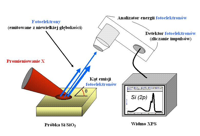 Schematyczny rysunek przedstawiający wzbudzanie próbki Si/SiO2 promieniowaniem rentgenowskim i emisja fotoelektronów.